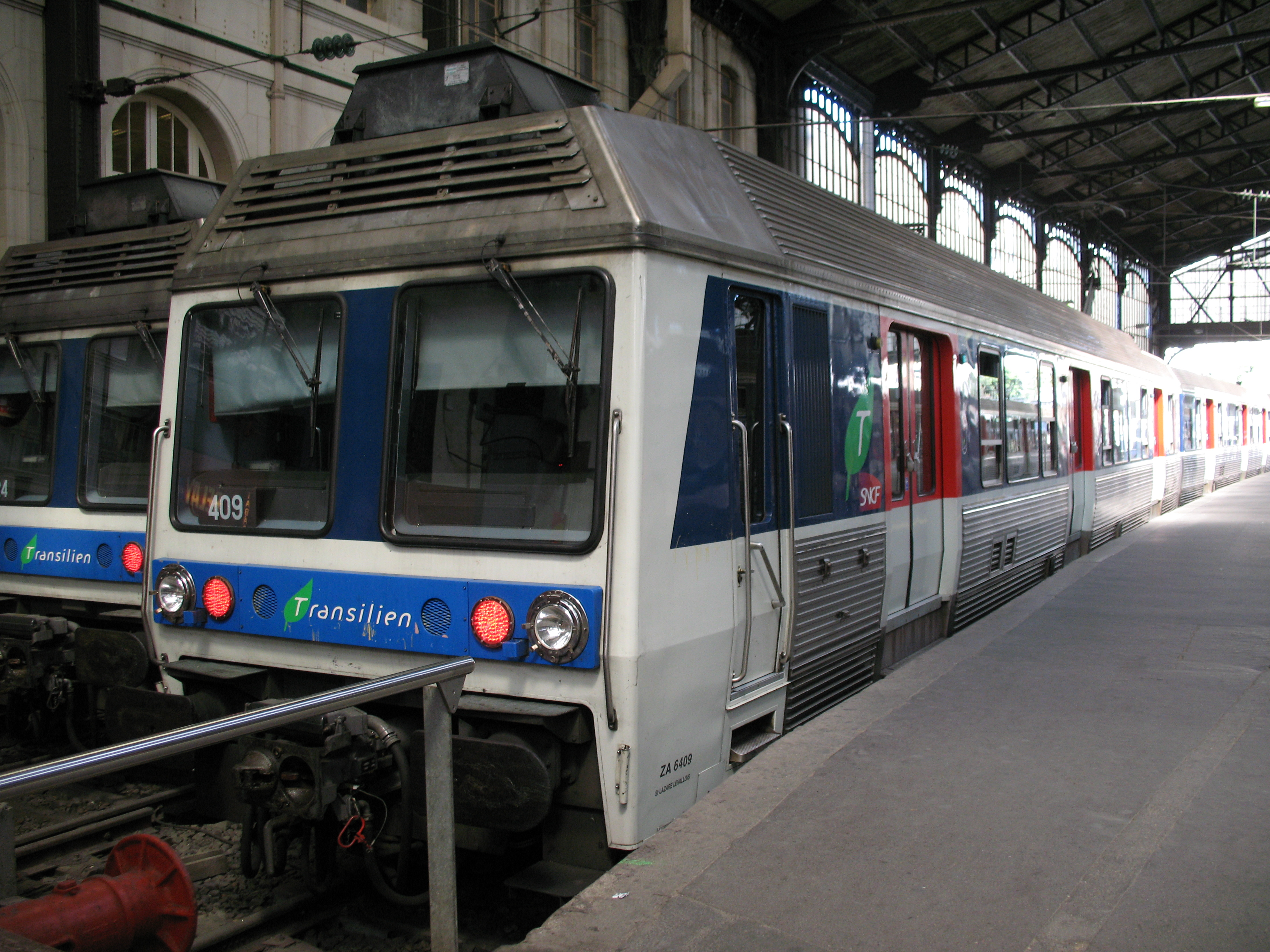 Une rame Z 6409 en attente de départ pour la ligne L à Paris Saint-Lazare.